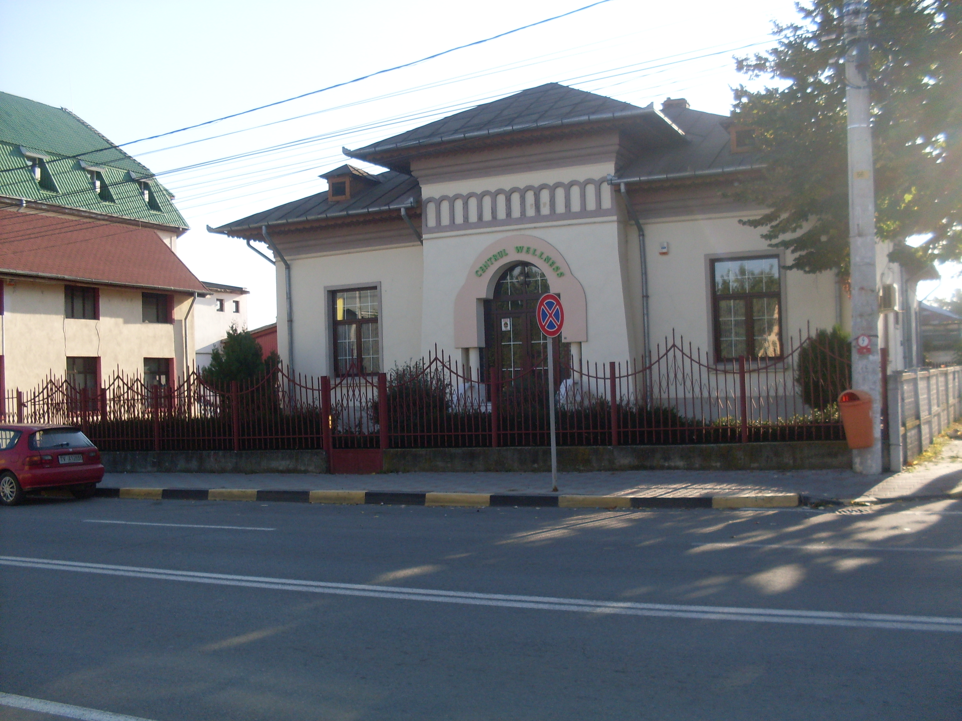 Casa Cruceanu